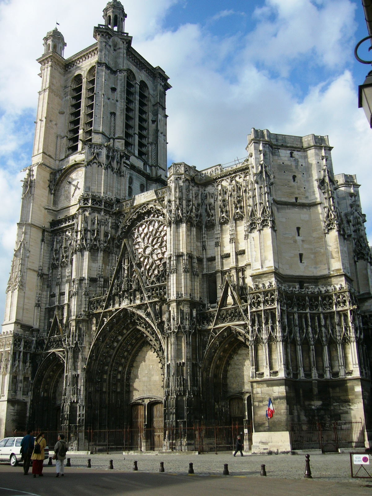 self made